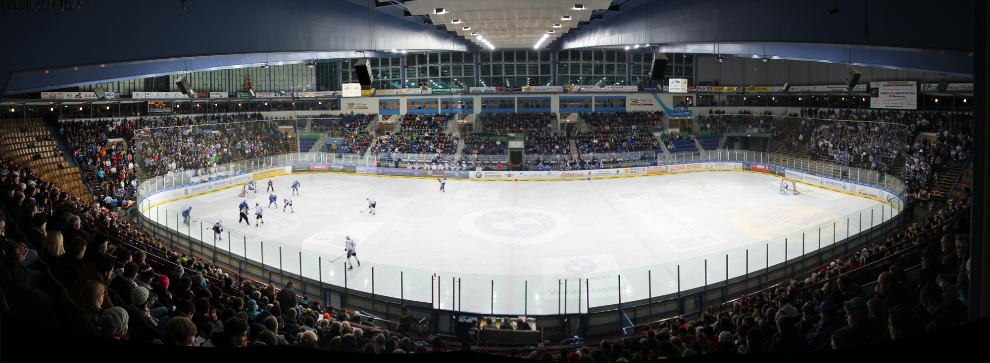 Panorama Innenansicht des Olympia Eissport Zentrums Garmisch-Partenkirchen. Aufgenommen von der Nordtribüne aus.